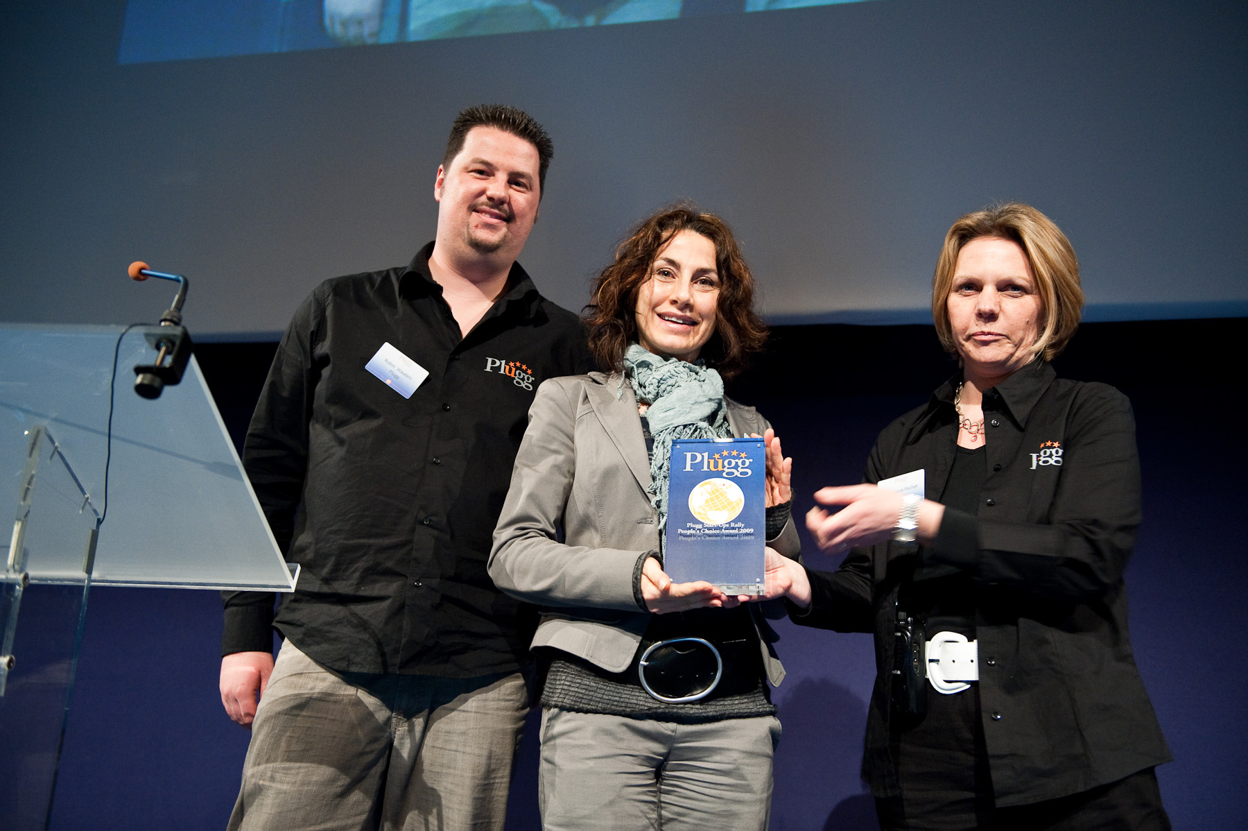 Plugg 2009